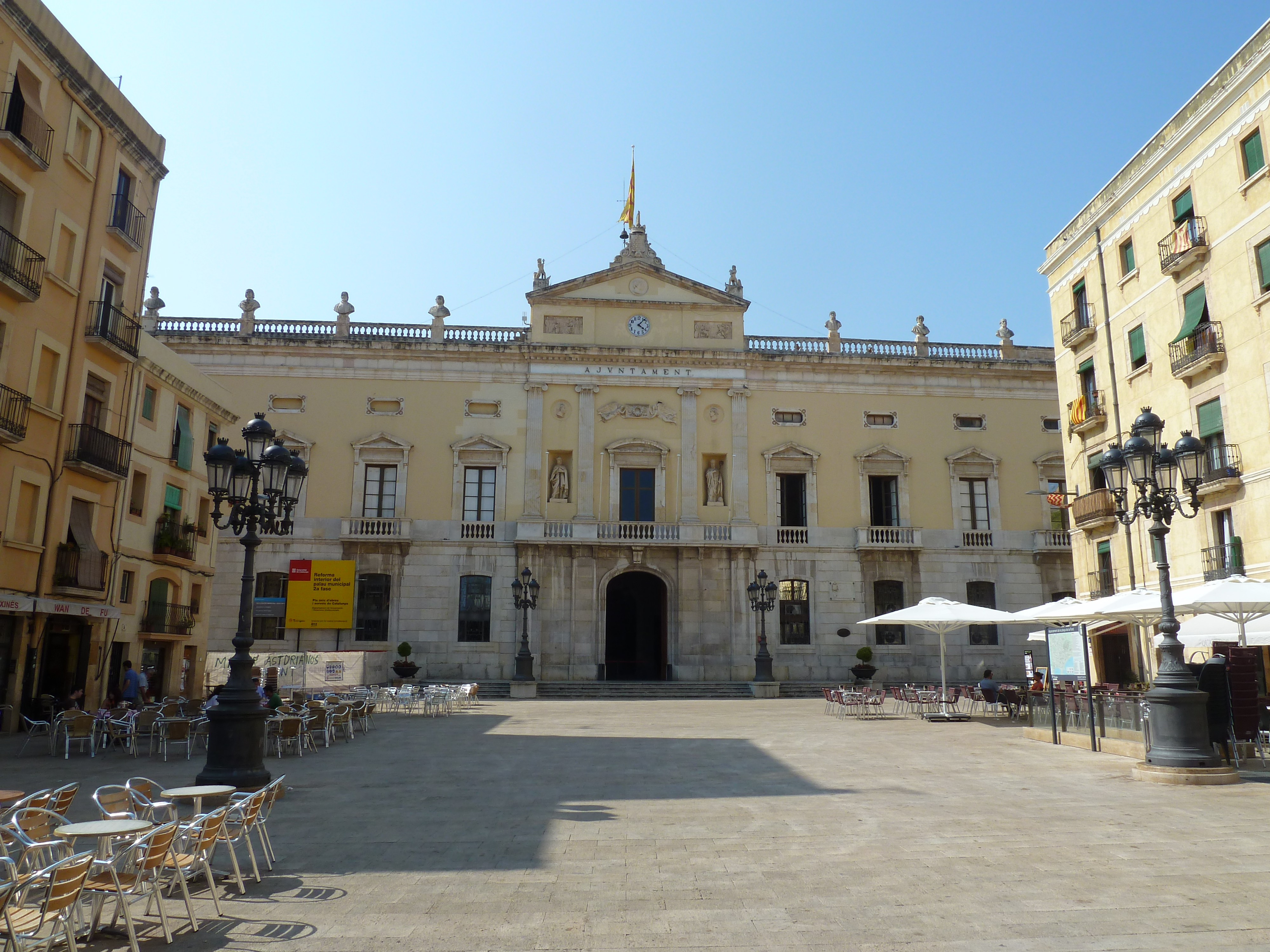 Tarragona